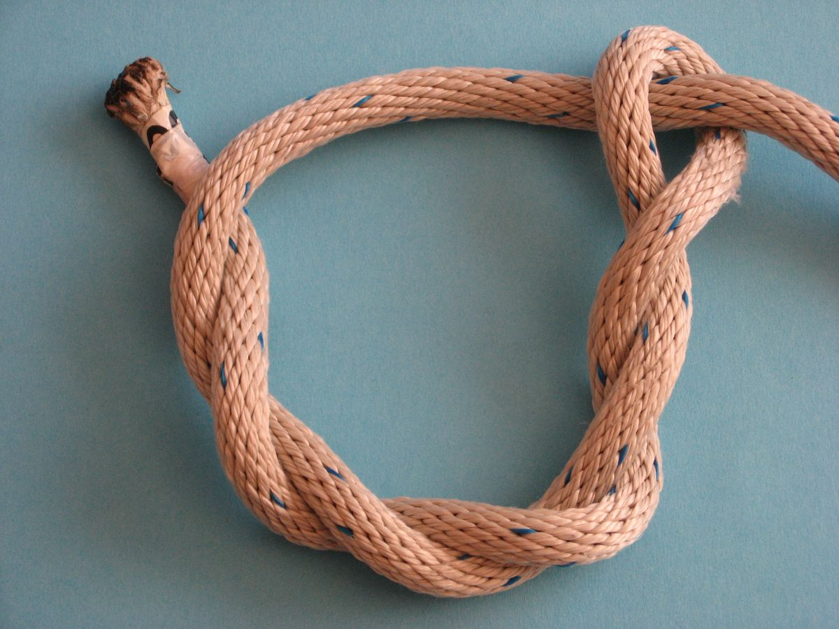 Zimmermannsschlag / Zimmermannsknoten